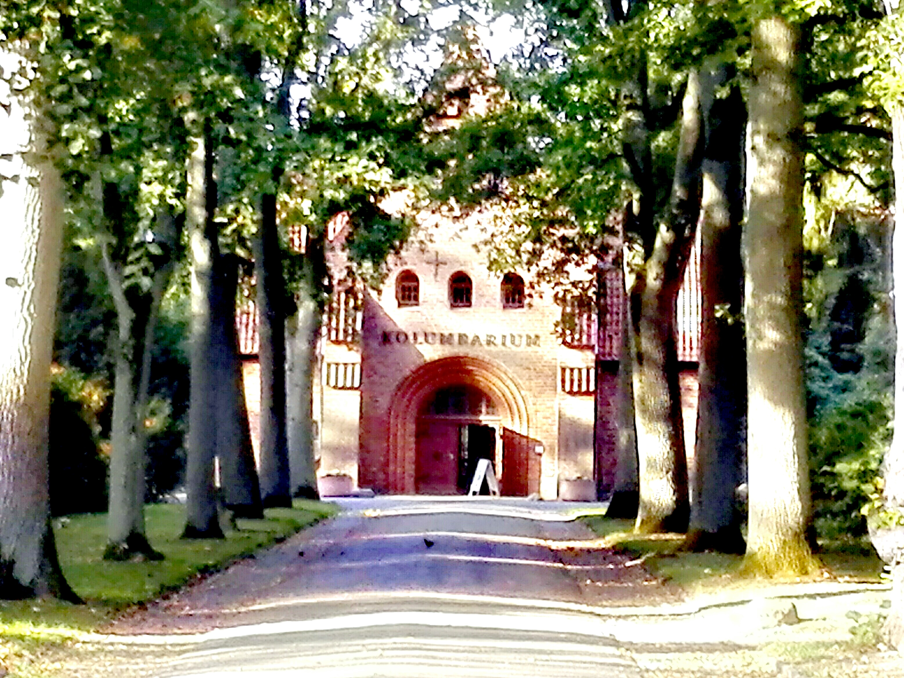 Kolumbarium von der Kapelle (1) aus gesehen.